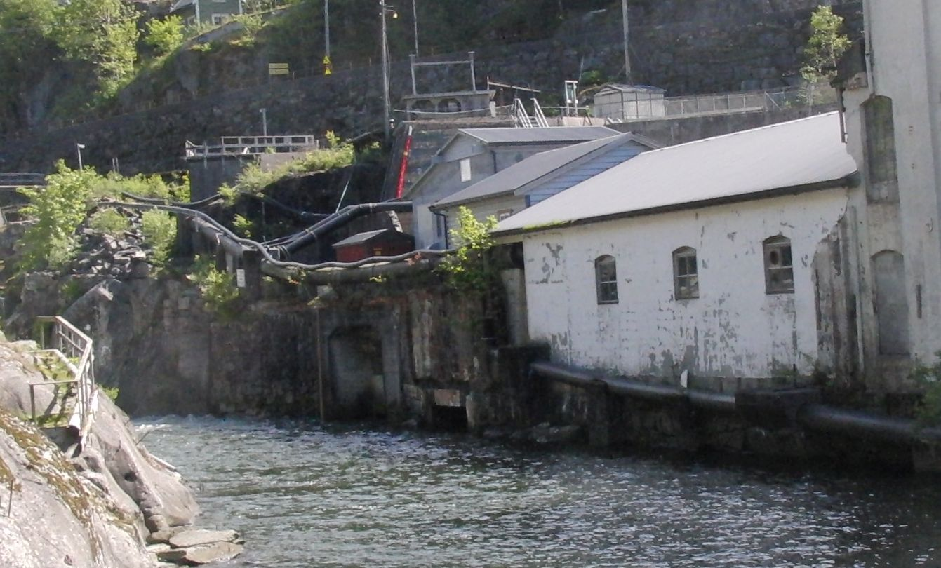 Sævareid kraftverk